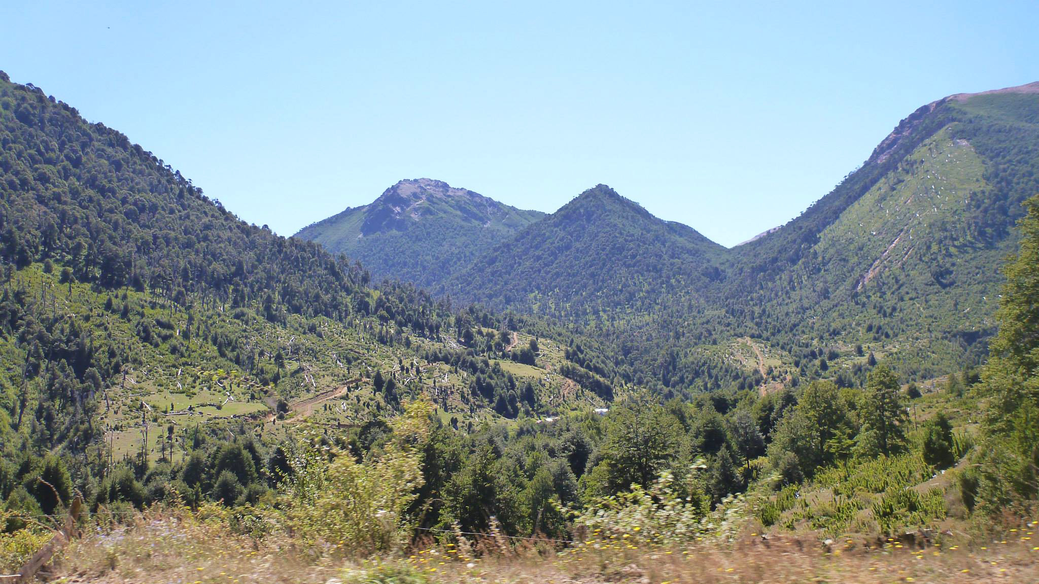 Fotografía en Movimiento. Vista en descenso de la Reserva Nacional China Muerta, ubicada en la comuna de Lonquimay, Región de la Araucanía.